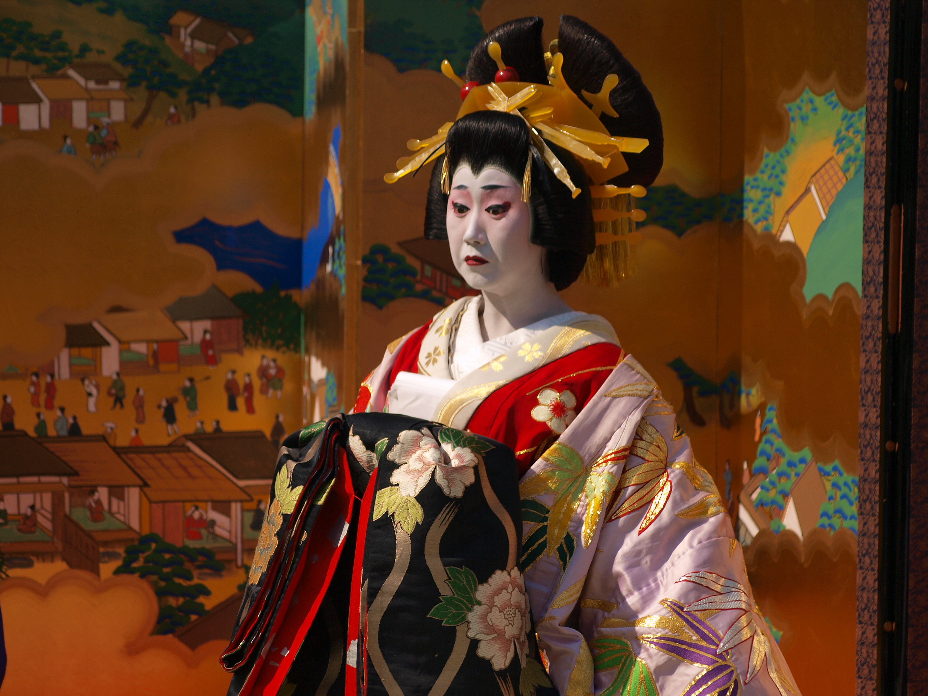 Oiran at Asakusa